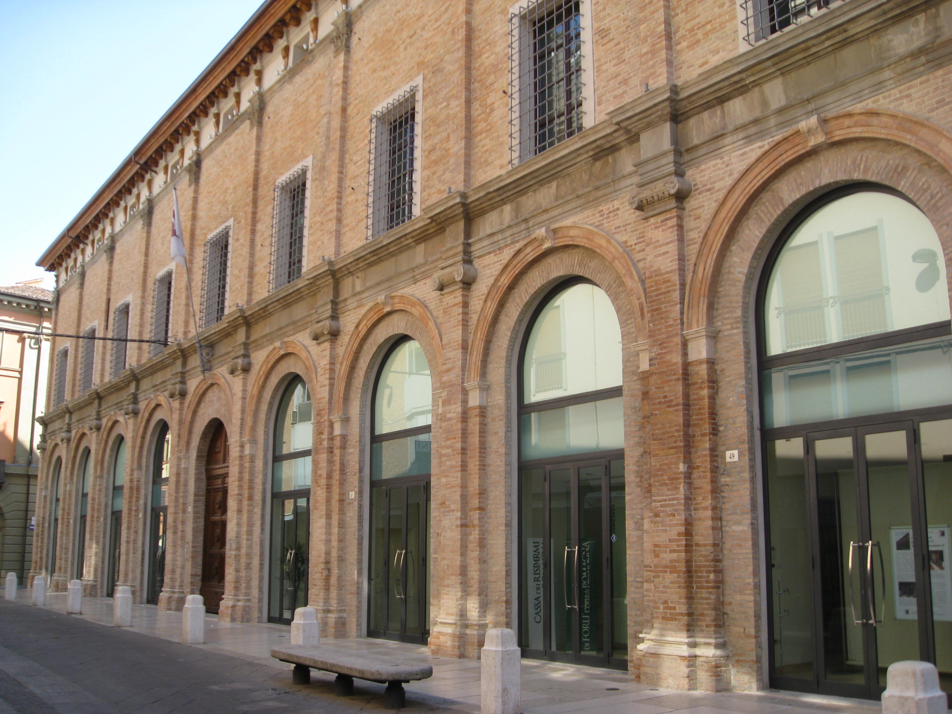 Perkele, Monte di Pietà (Forlì), foto propria